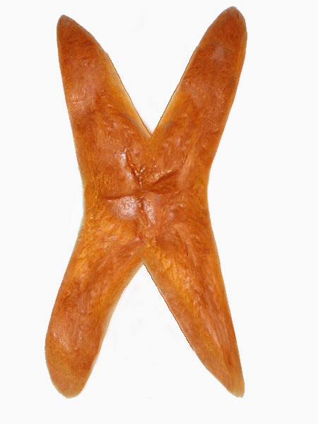 Le quénieu champenois, vendu par le boulanger le soir de Noël, pour être dégusté au retour de la messe de minuit